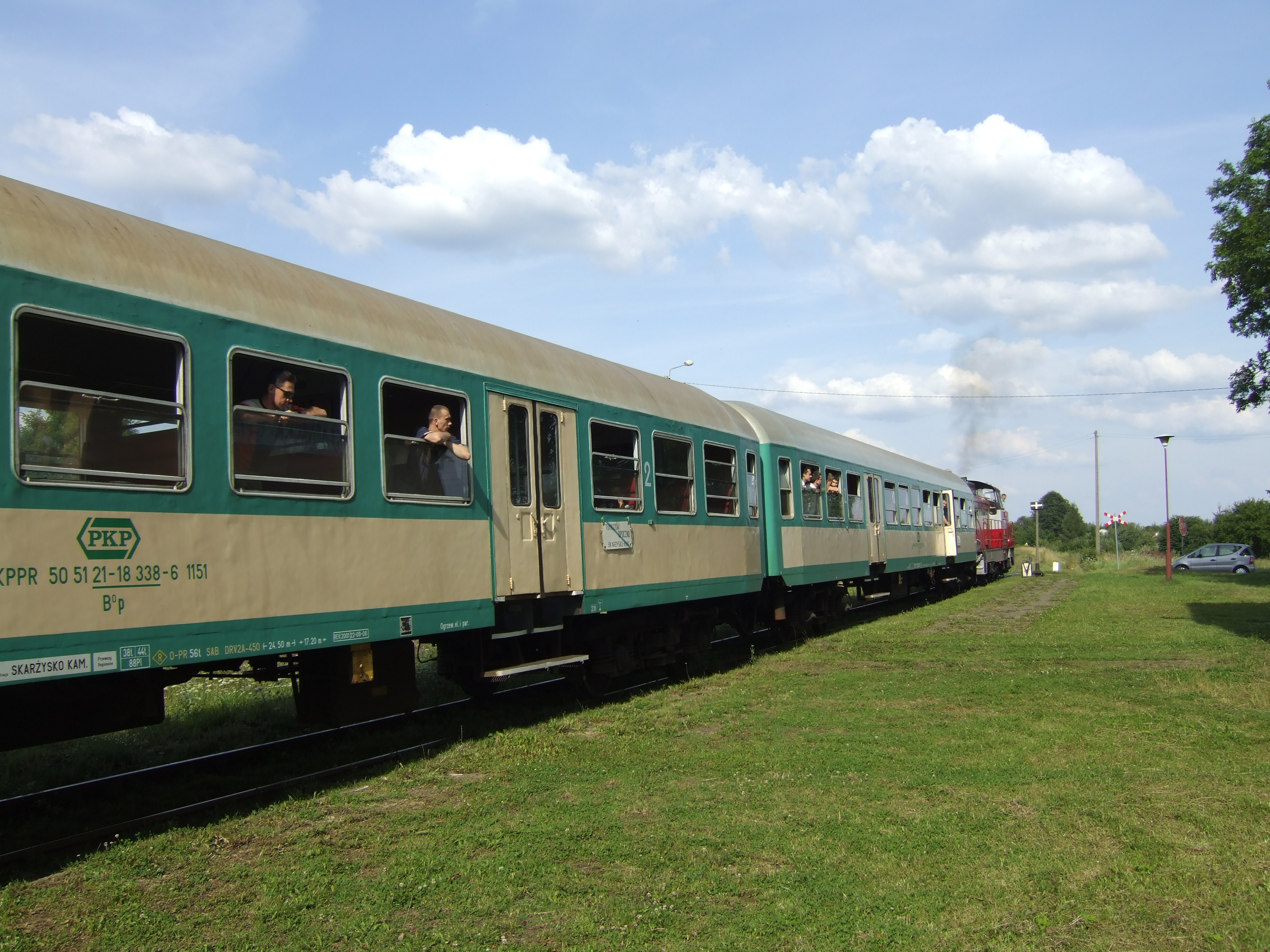 Ostatni pociąg relacji Skarżysko-Kamienna - Tomaszów Mazowiecki.